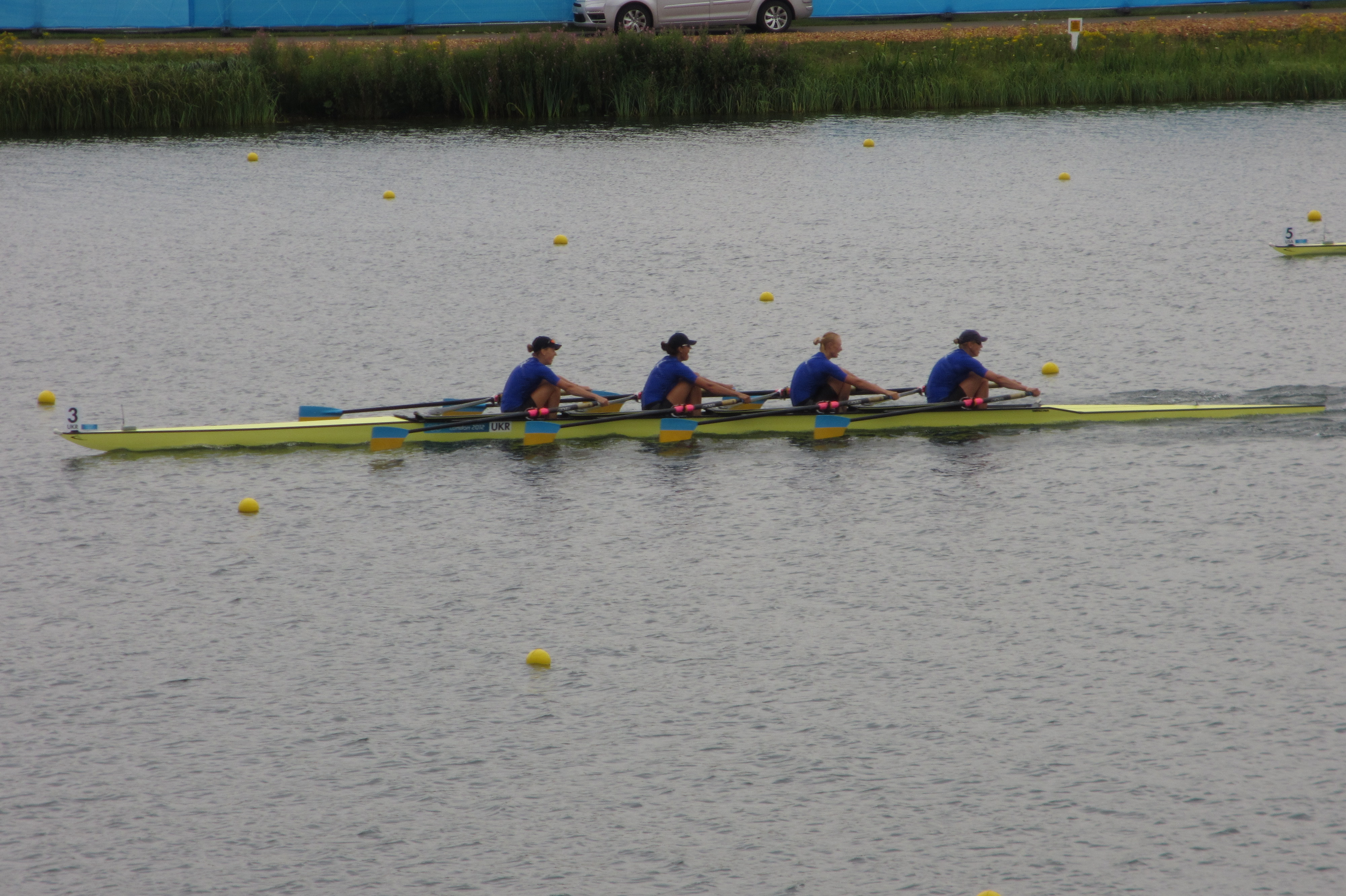 Kateryna Tarasenko, Nataliya Dovgodko, Anastasiia Kozhenkova and Yana Dementieva on their way to gold